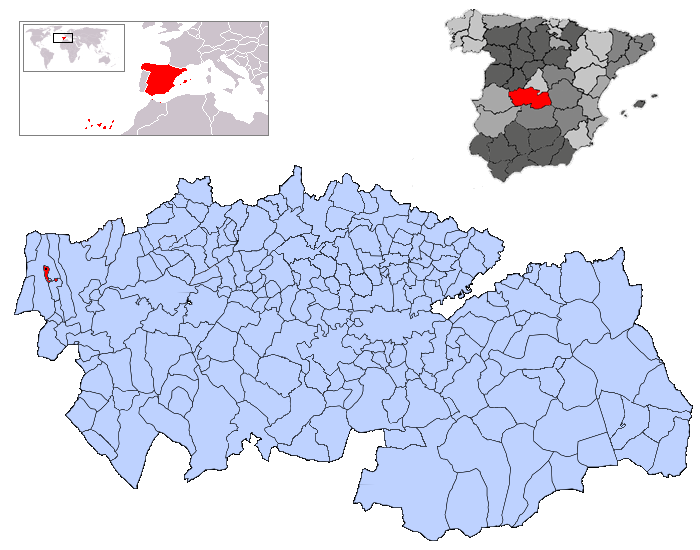 Las Ventas de San Julián en la provincia de Toledo